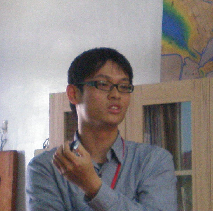 在打狗鐵道故事館演講的古庭維，2011年